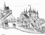 Müllegger Tor